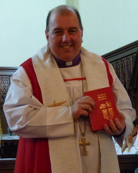 Dom João Câncio Peixoto - Bispo Anglicano